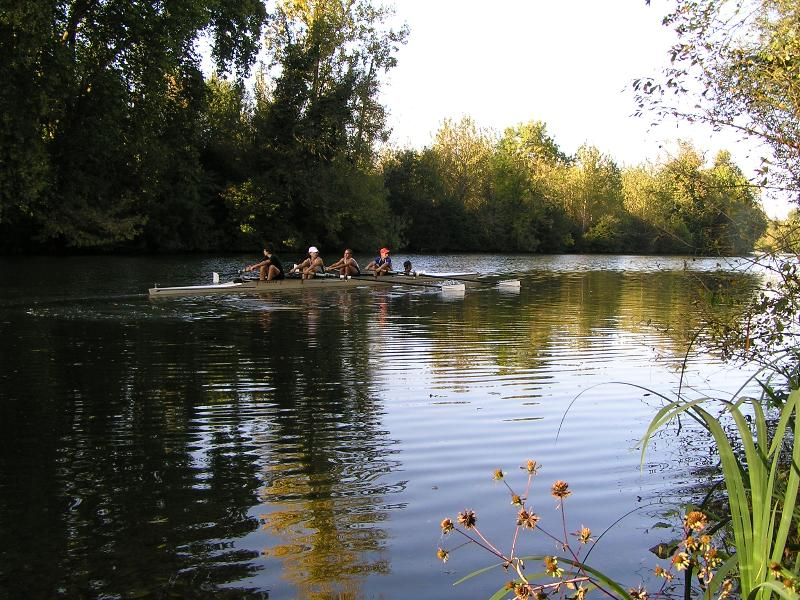 Fleuve Charente en amont de Cognac